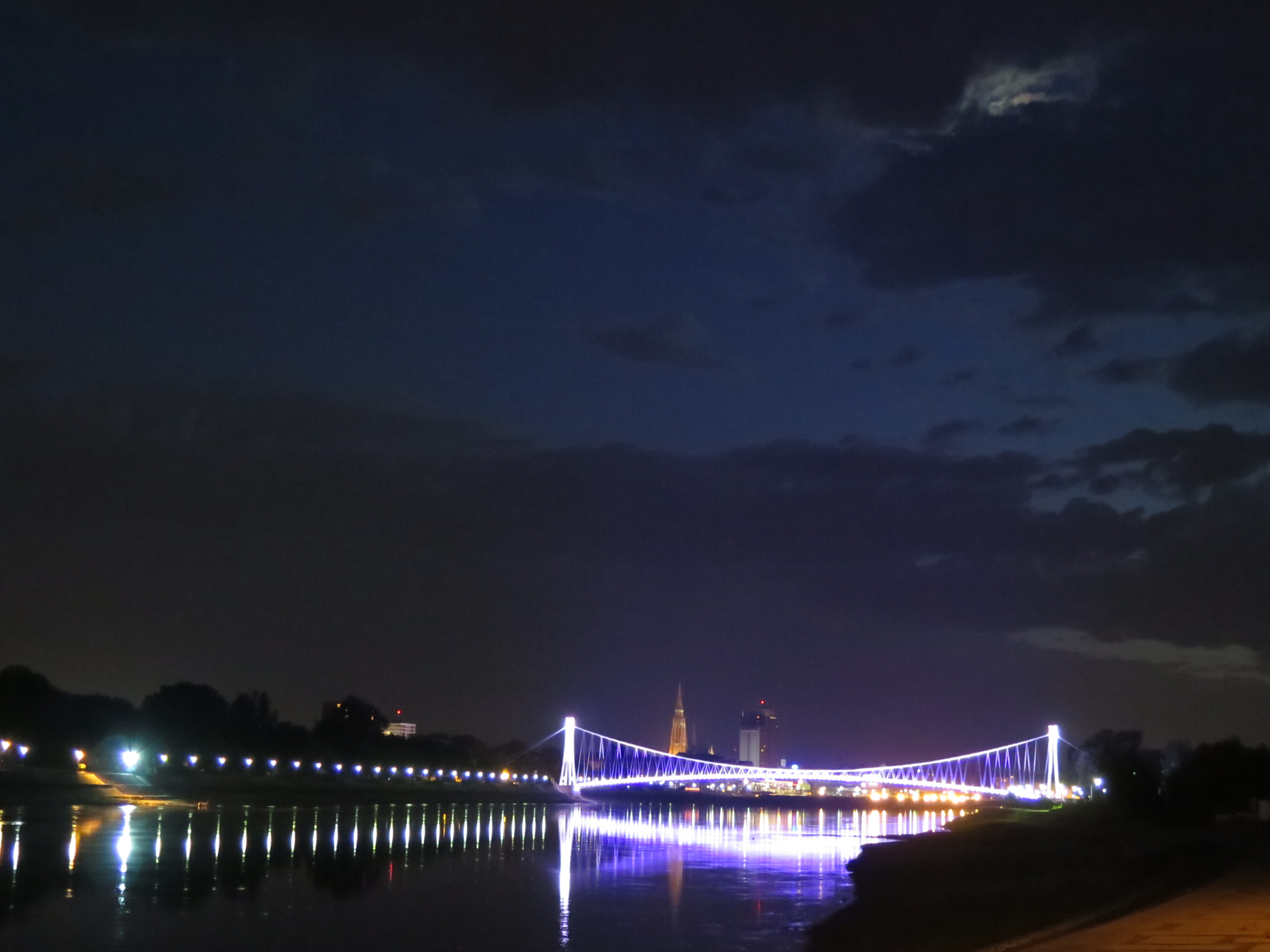 Pogled s lijeve obale Drave